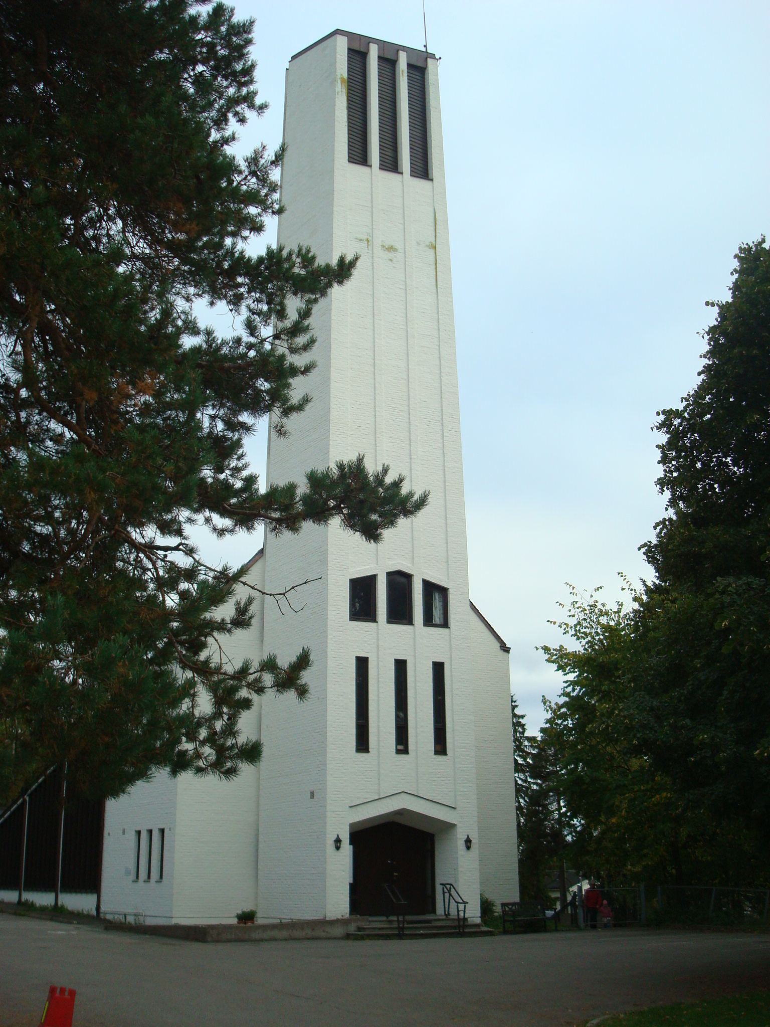 Nordberg kirke i Oslo.